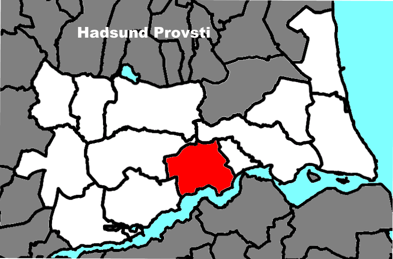 Sognets beliggenhed i Hadsund Provsti.